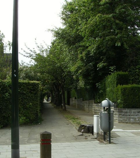 Avenue des Citrinelles Auderghem Belgium - sentier